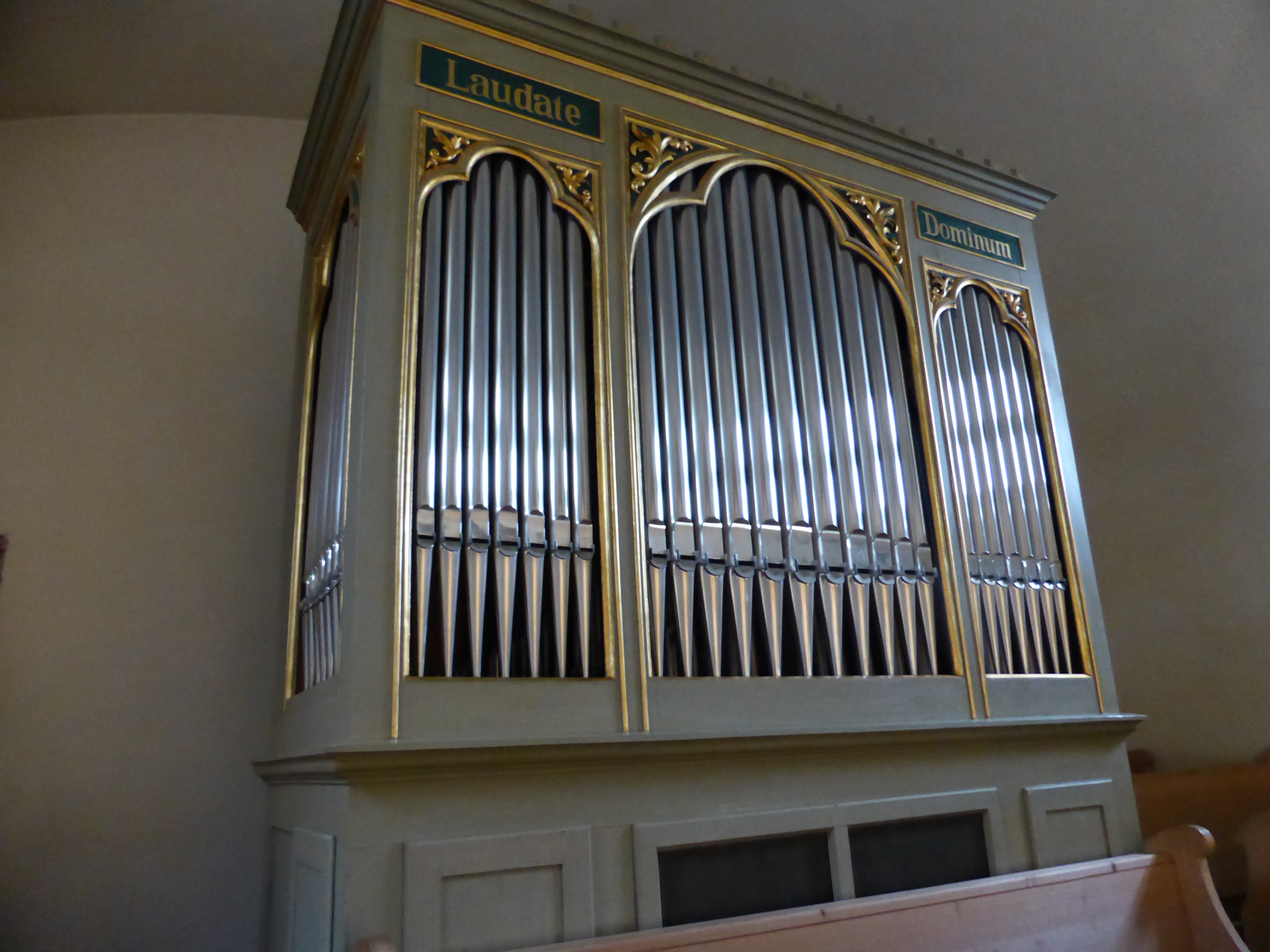 Orgel von Albert Mauracher in Krispl